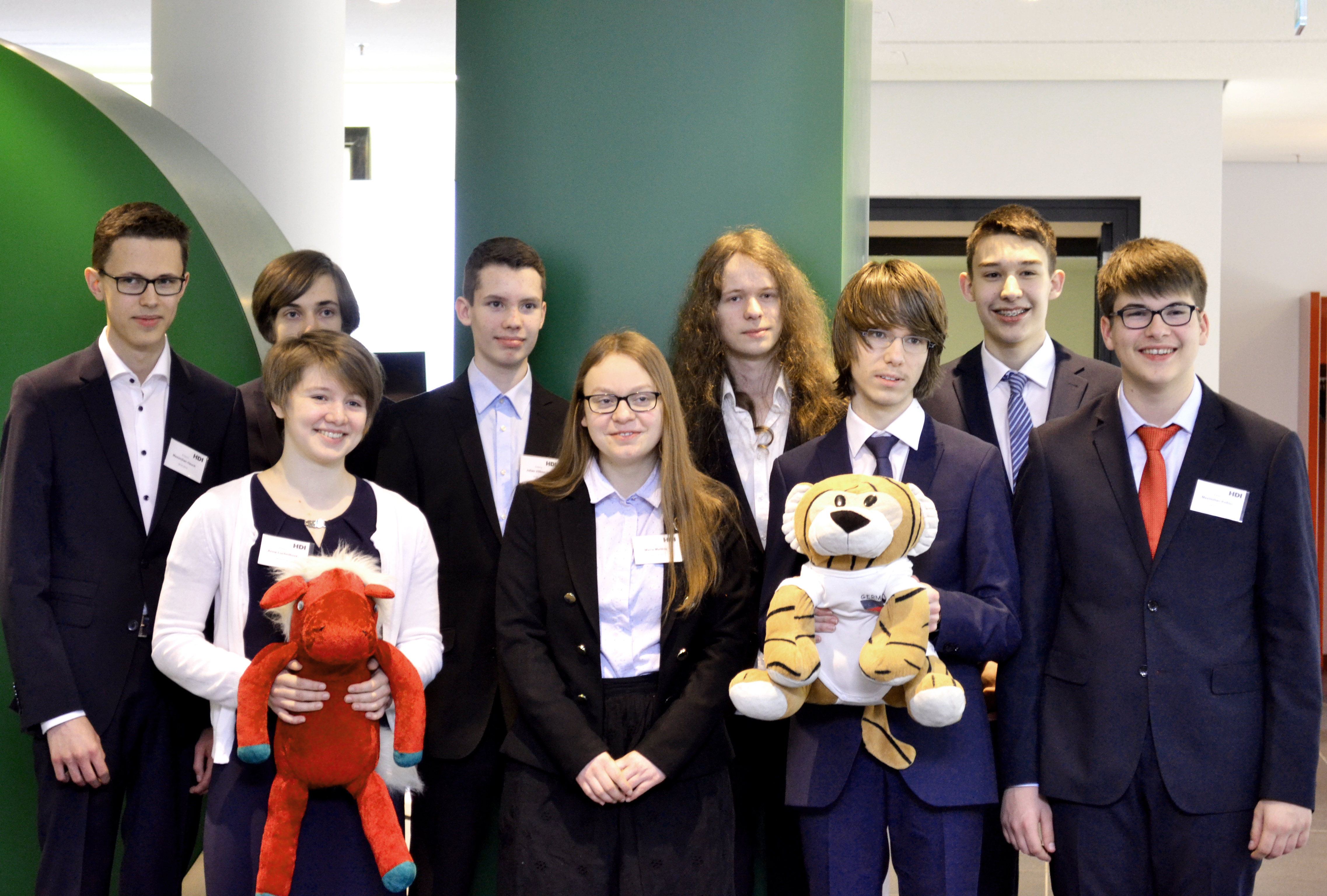 Gruppenfoto der Bundessieger des Bundeswettbewerbs Mathematik, aufgenommen am 28.3.2019 im Rahmen der Preisverleihung in Köln.